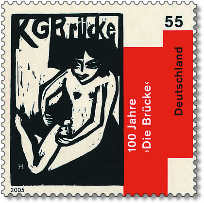 Katalogumschlag der Künstlergemeinschaft "Die Brücke" mit dem Holzschnitt "Sitzende Fränzi", 1910, Erich Heckel